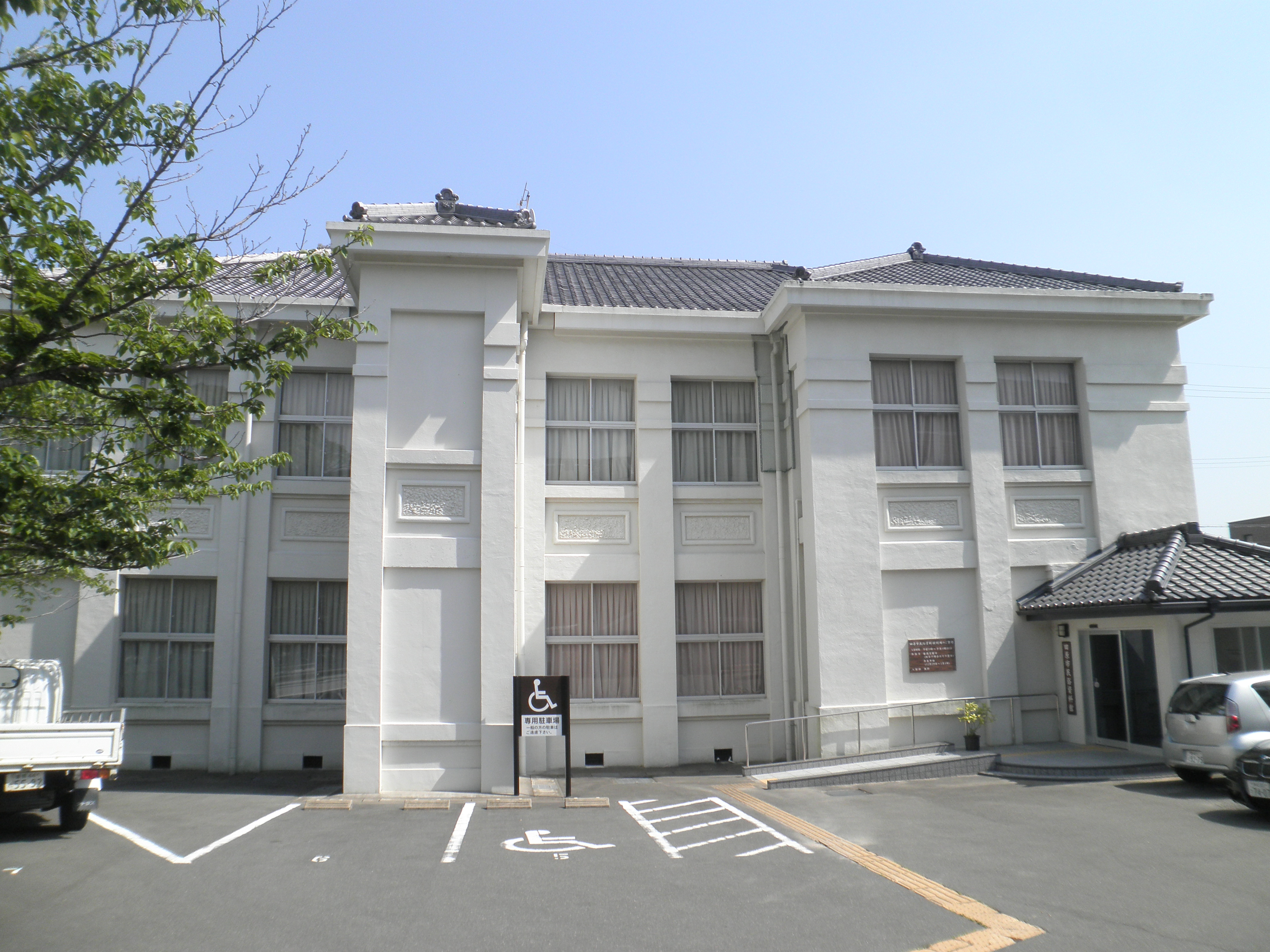 愛知県田原市の田原市民俗資料館